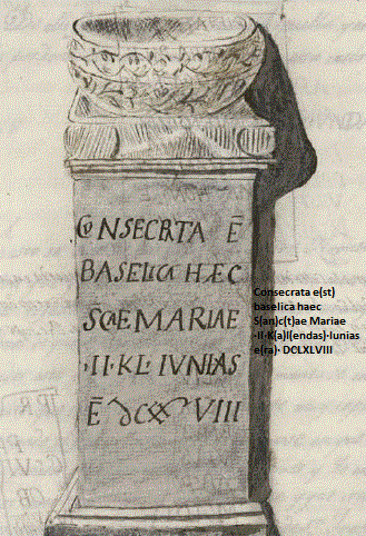 Ara del obispo Bacauda siglo VII Iglesia de San Juan Bautista del Barrio del Cerro de Cabra dibujo de Francisco Pérez Bayer año 1782